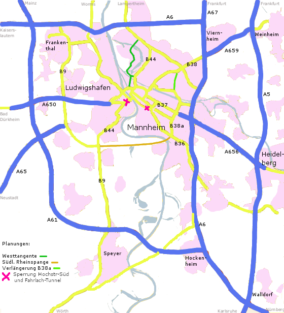 Straßenverkehr Mannheim